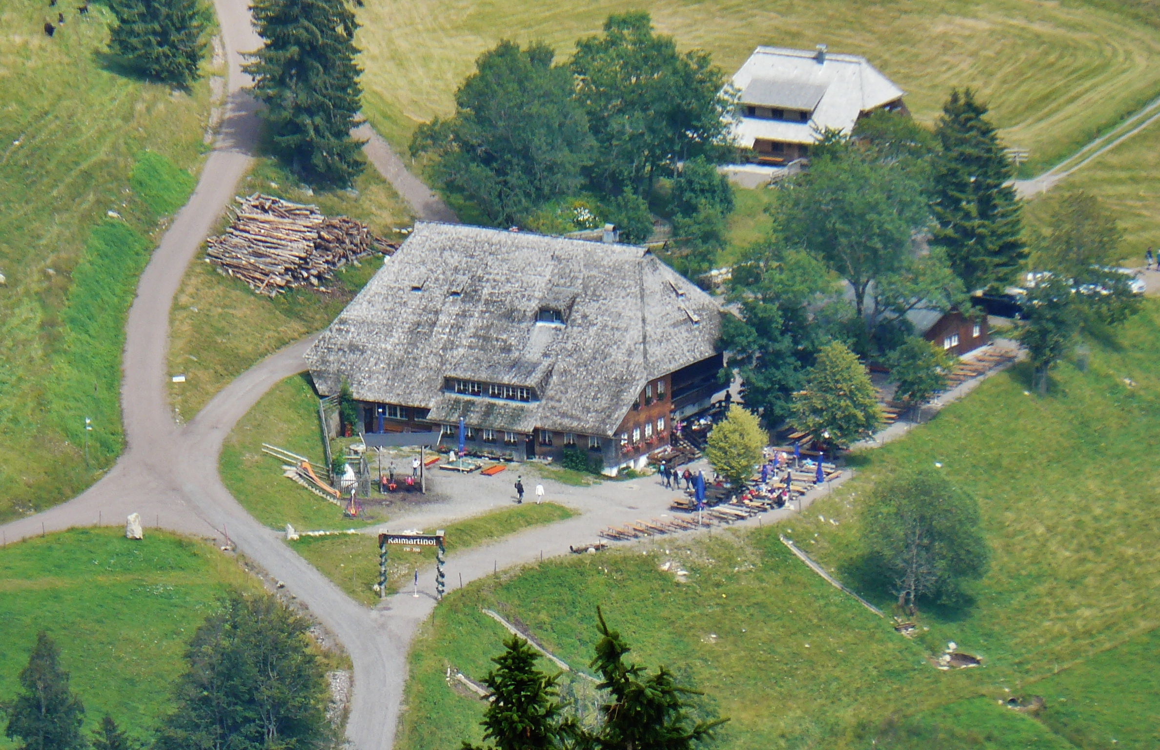 Raimartihof - Gasthaus zum Feldsee